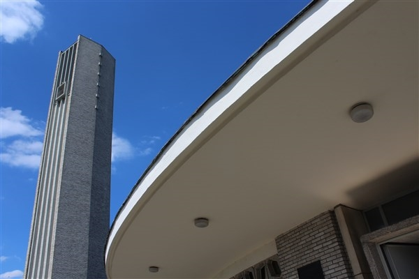 We kijken recht op de betonnen luifel van de inkompartij. De gebogen vorm van de kerk is duidelijk zichtbaar. De toren, die los staat van de kerk, heeft een vrij open klokkentoren.